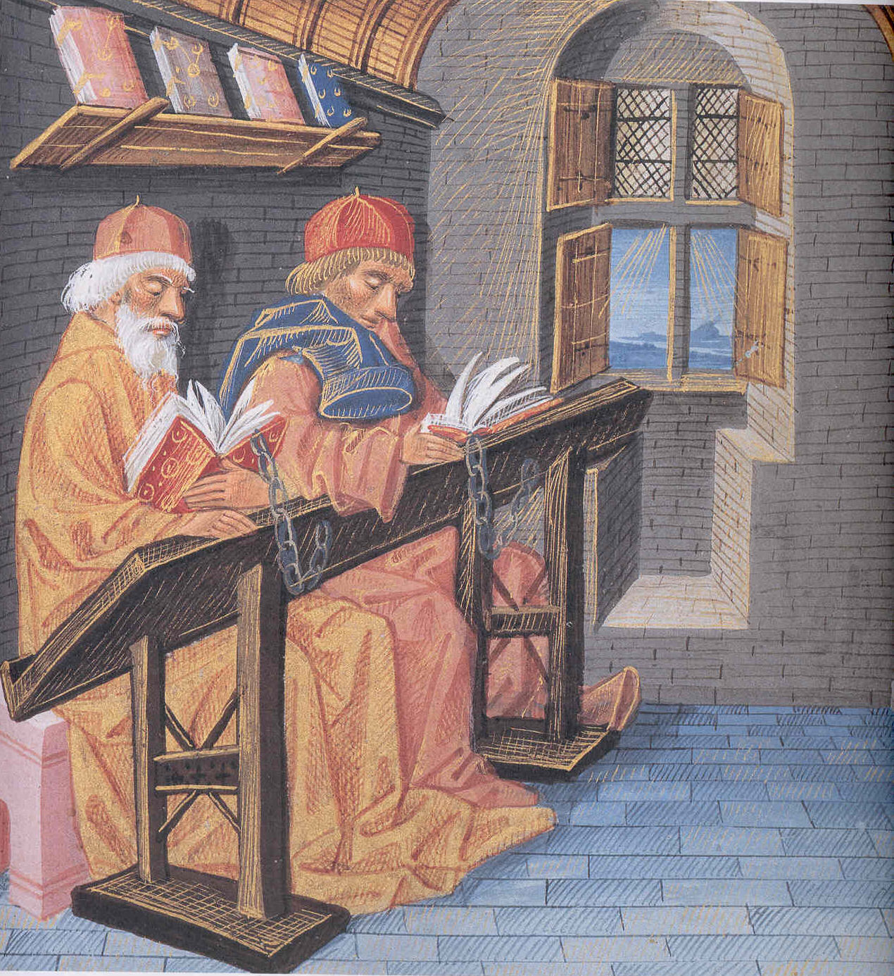 Leser in einem Skriptorium oder in einer Bibliothek Buchillustration, 15. Jahrhundert Musee Condé, Chantilly